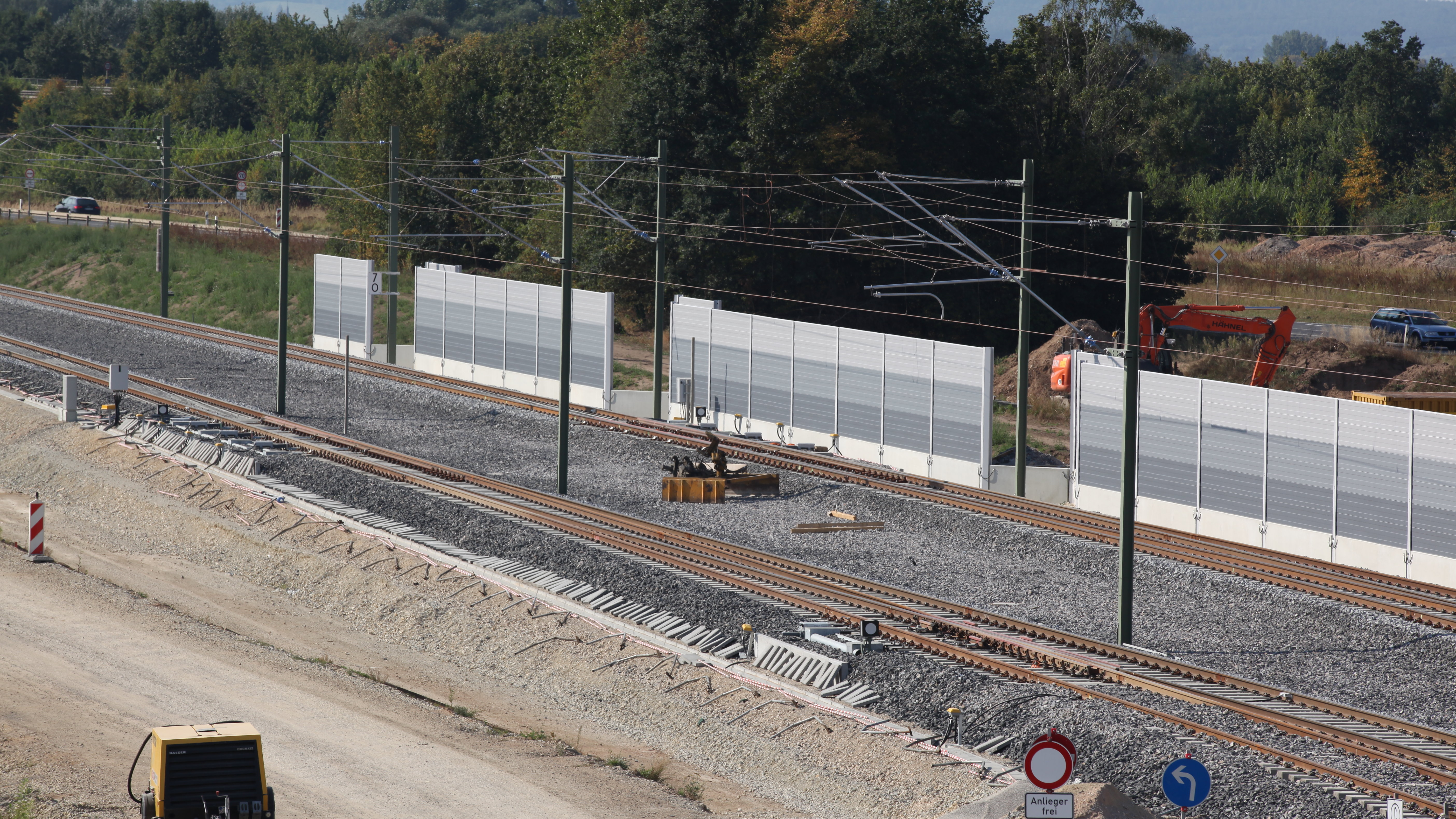 ABS-Nürnberg-Ebensfeld, bei Breitengüßbach, Trennung NBS und ABS